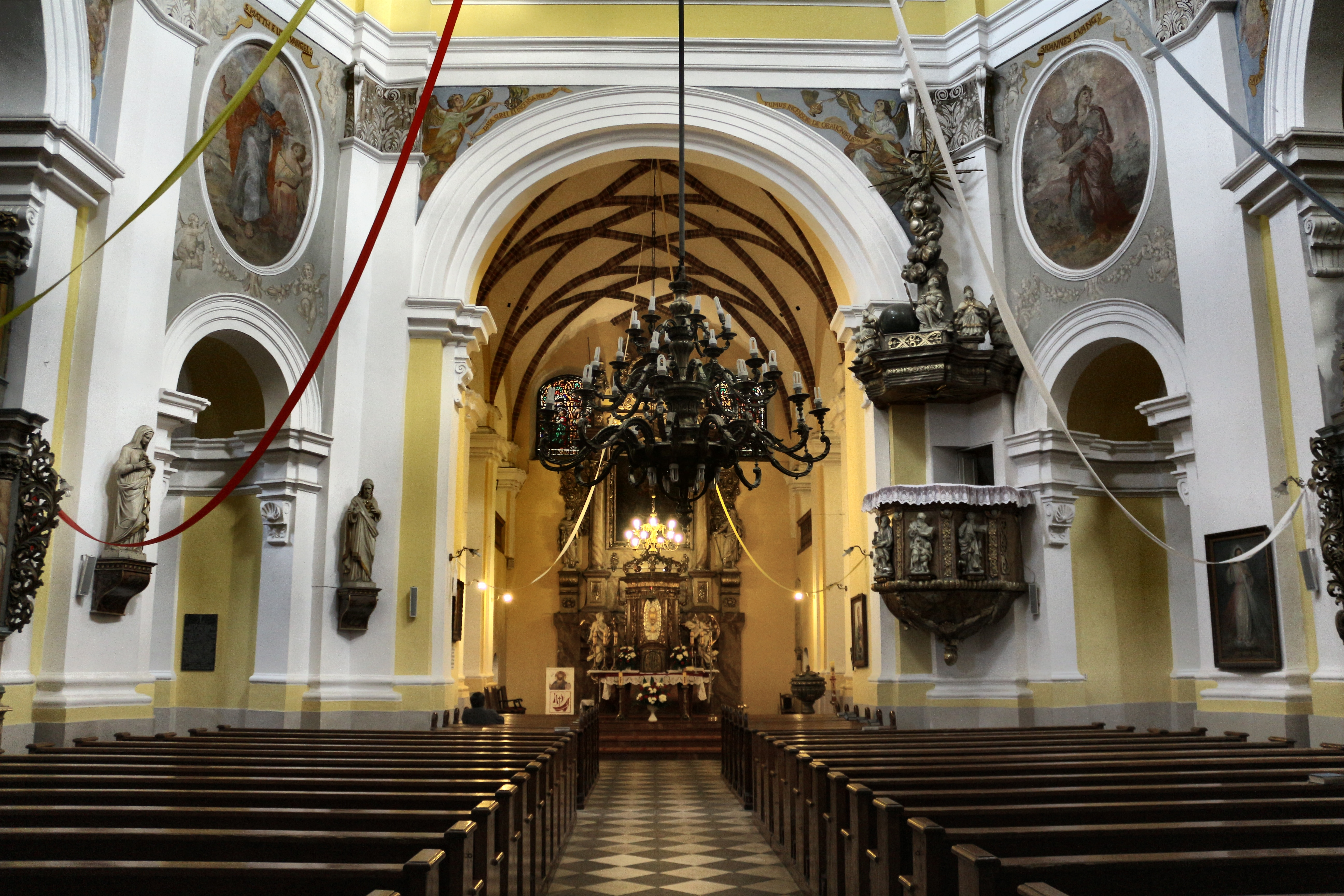 Wschowa, zespół kościoła par. p.w. św. Stanisława Biskupa